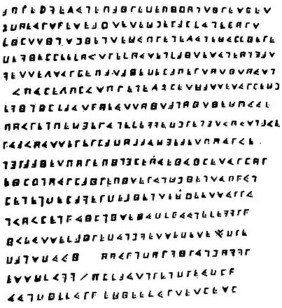 Cryptogramme du Forban" trouvé à l'île Mahé. C'est un message chiffré, lancé dans la foule par le pirate La Buse montant au supplice, qui révélerait l'emplacement de ses trésors.